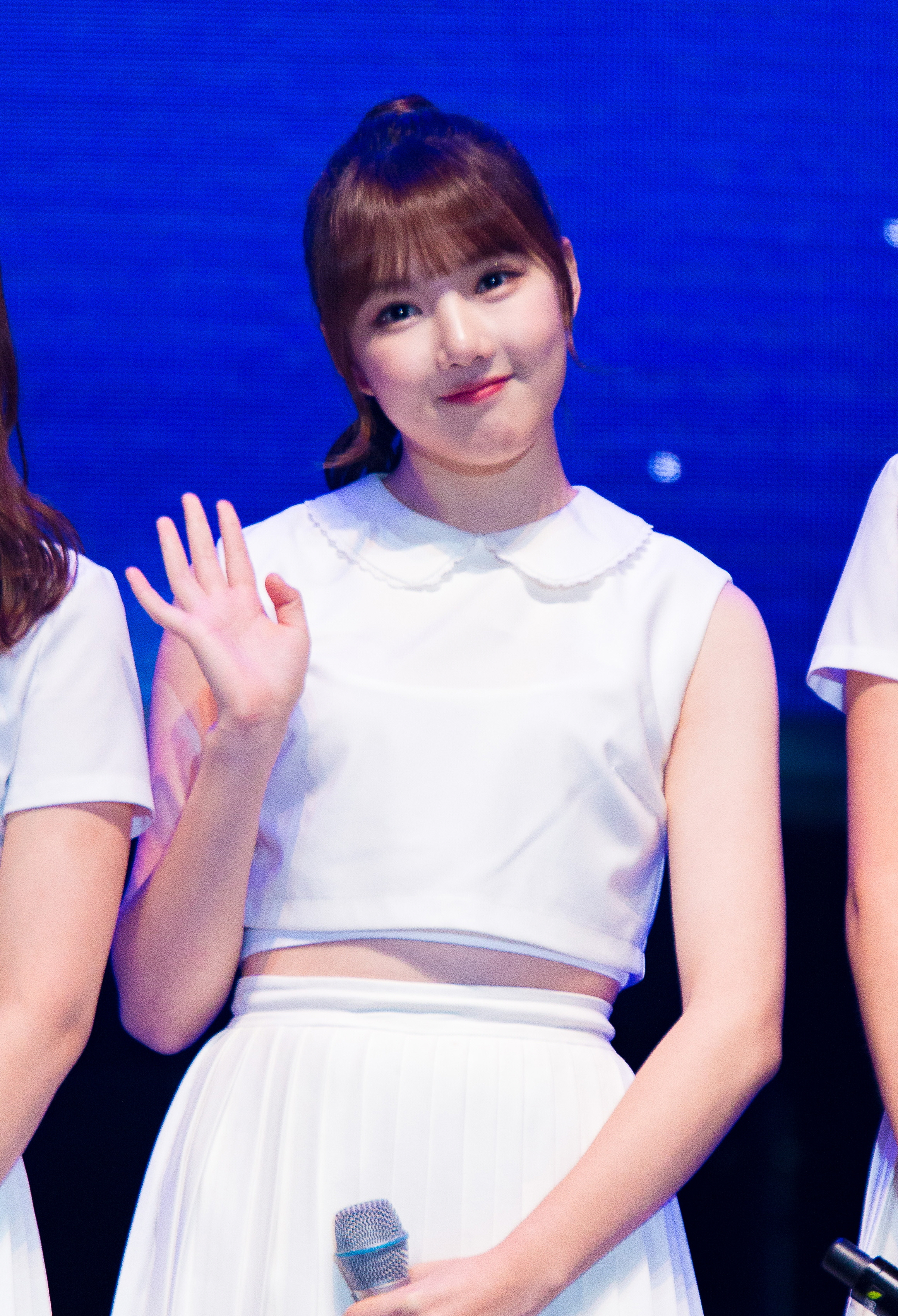 20161009 여자친구 예린 김창렬의 올드스쿨 공개방송